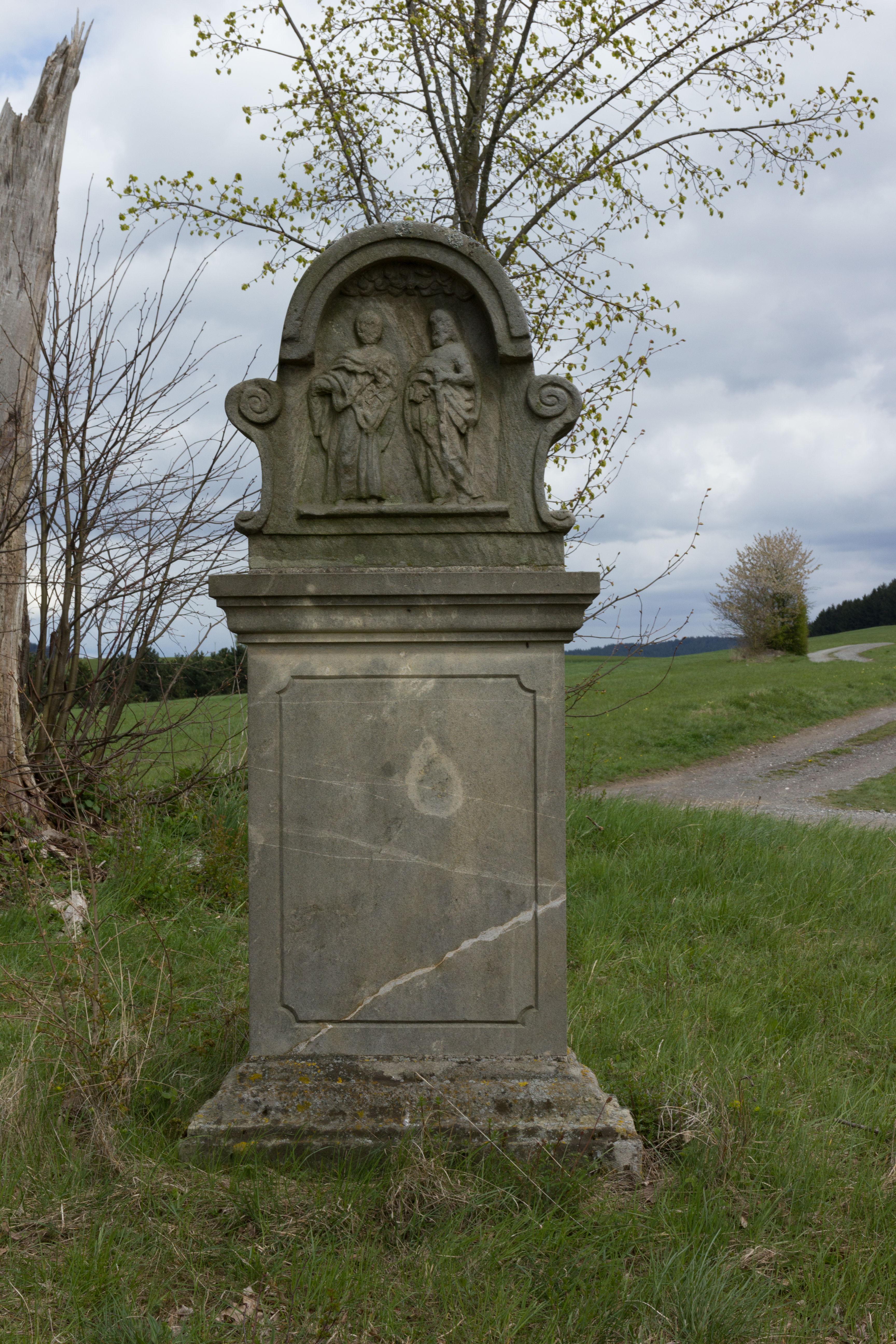 Sandsteinrelief mit Rundbogen zwischen Rennesberg und Friesen in Kronach